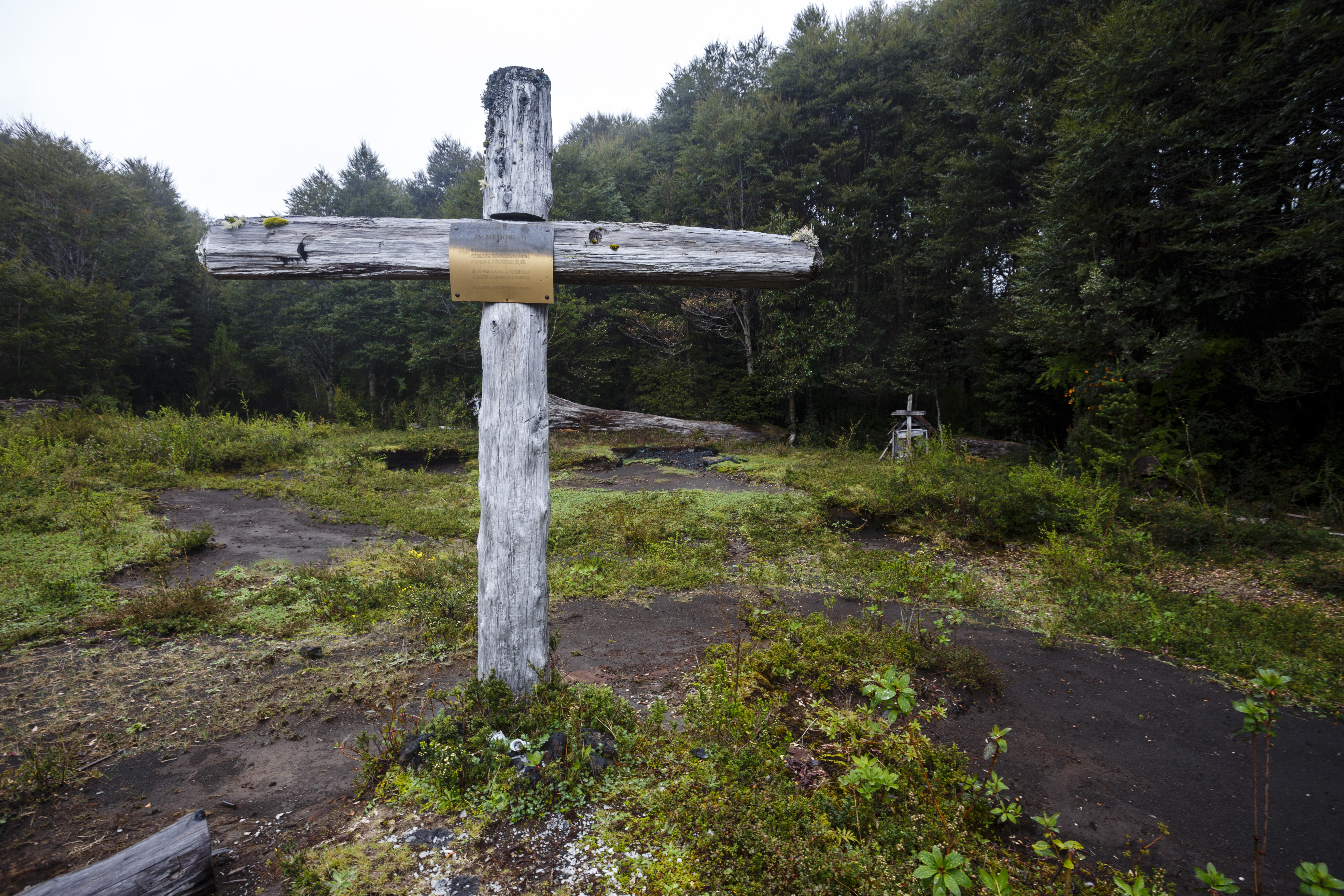 Cruz que recuerda a víctimas del aluvión de 1965 en lago Cabrera, Hualaihué, Chile.